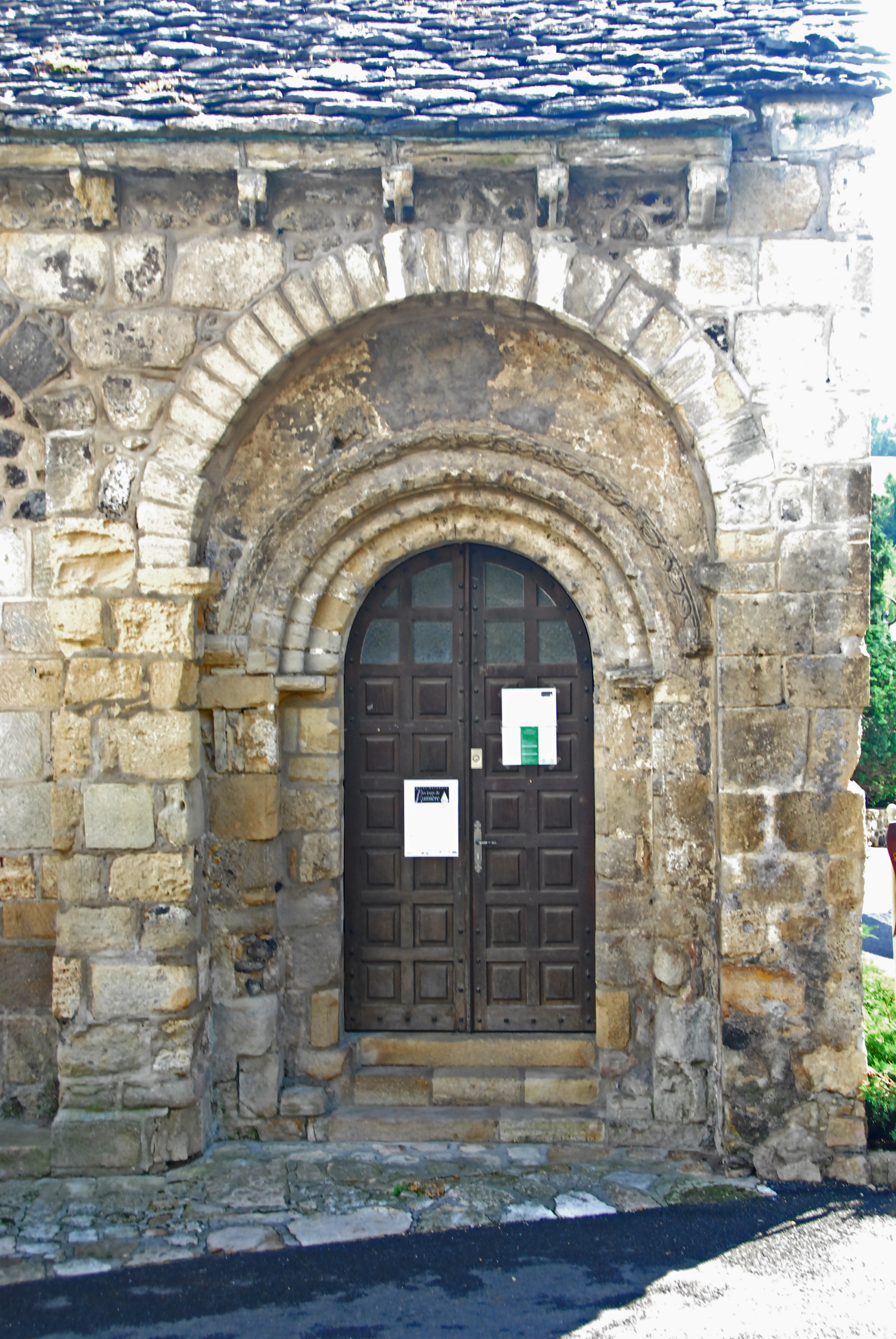 Saint-Saturnin, Chap. St-Madeleine, Portal von NW